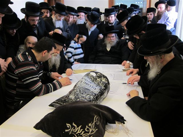 מכירת חמץ בערב פסח בחצר בעלזא